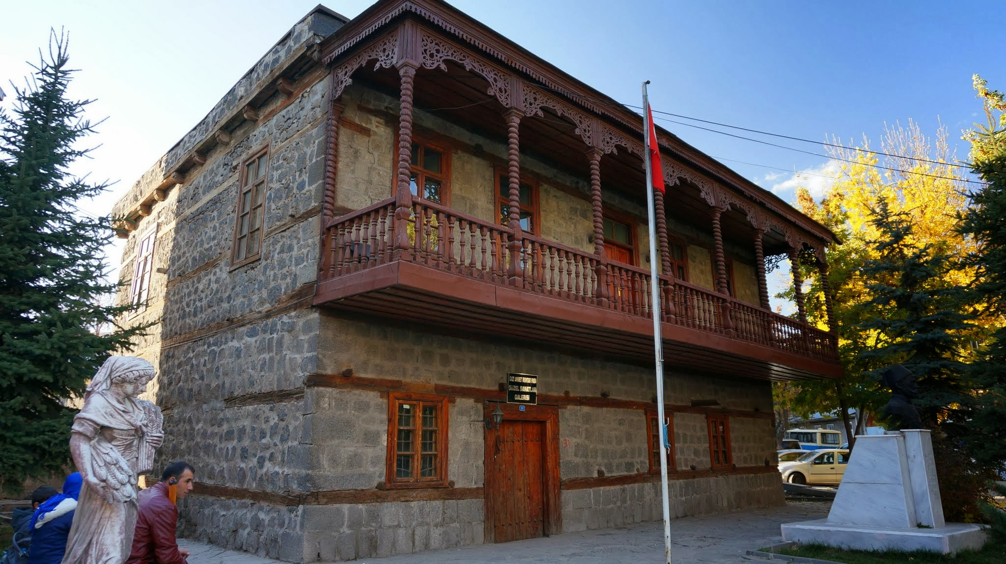 Kars, 36000 Kars Merkez/Kars, Turkey